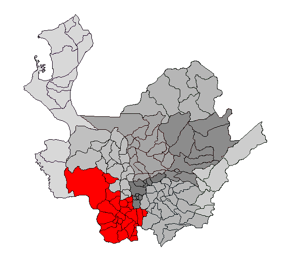 Ubicación de la región Suroeste en el departamento de Antioquia